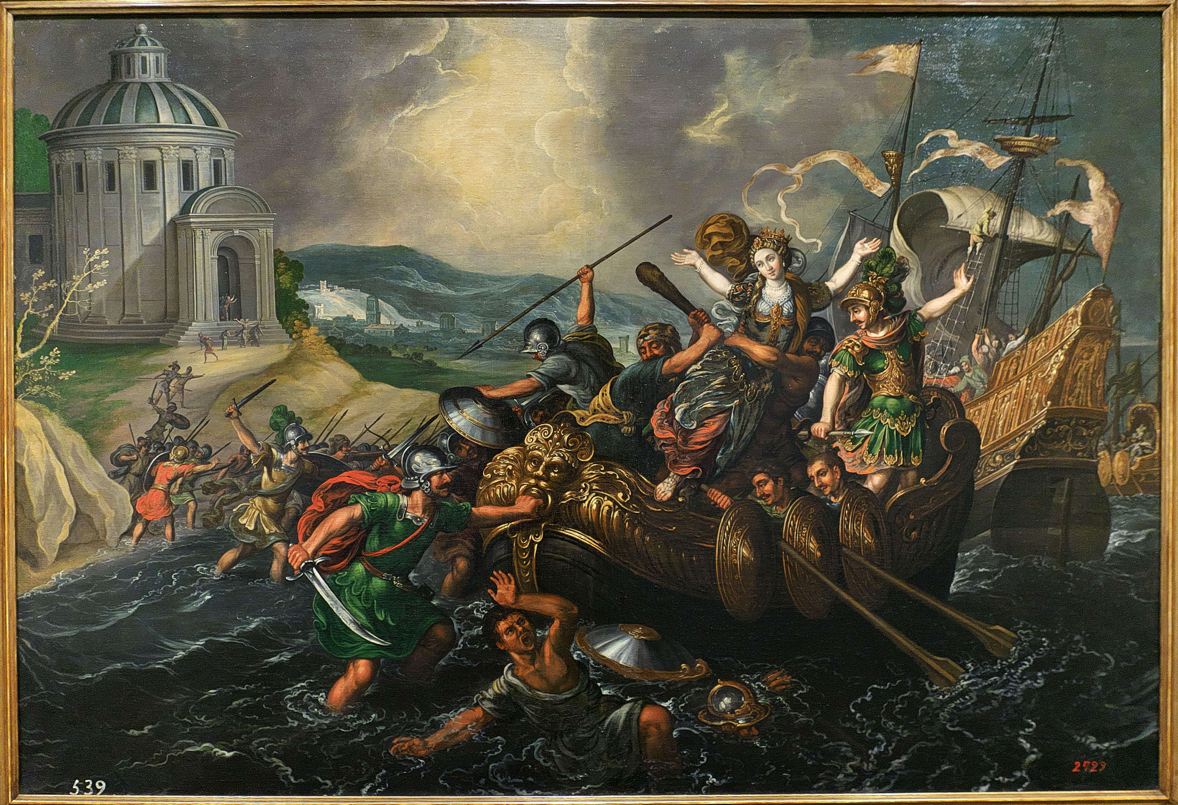 Juan de la Corte pinta al óleo sobre lienzo (1601-1650) el Rapto de Helena por Paris.